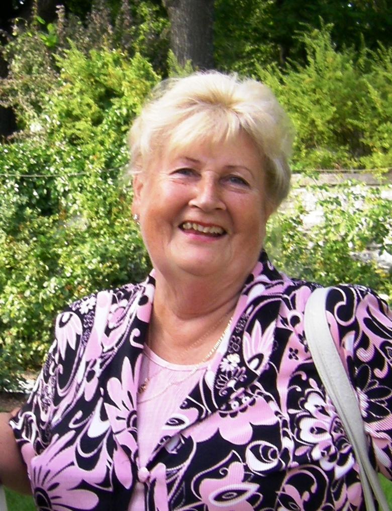 Mai Kolossova